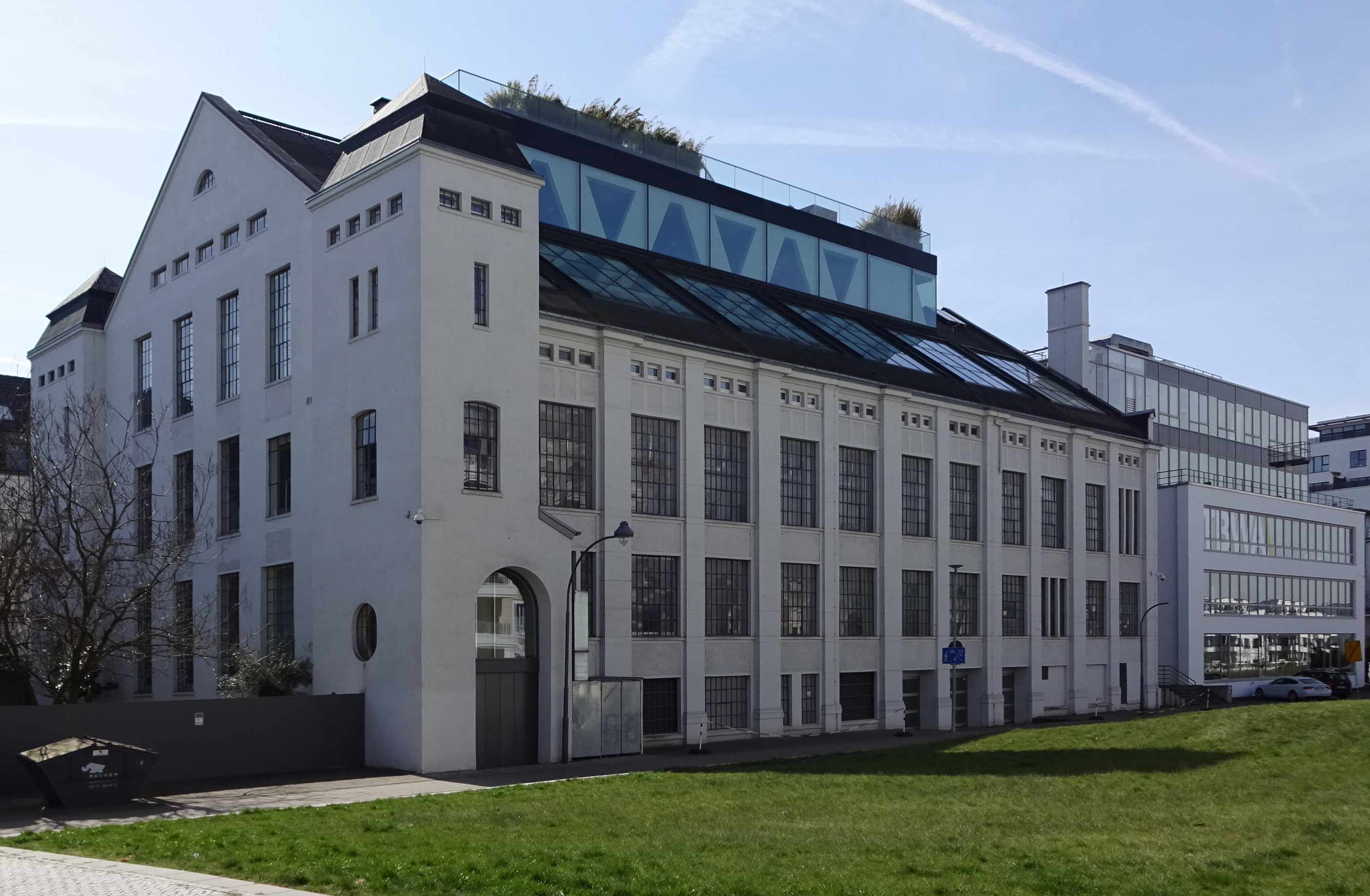 Gebäude "Julia Stoschek Collection und Foundation e.V." Schanzenstraße 54 und 54a, Seite zum Greifweg, Düsseldorf-Oberkassel